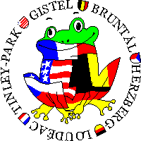 Beschreibung: Büdingen - Logo der Städtepartnerschaften Quelle: Stadt Büdingen Zeichner: Steschke 13:31, 3 Jan 2005 (UTC) nach einer Vorlage der Stadt Andere Versionen: Lizenzstatus: GNU FDL